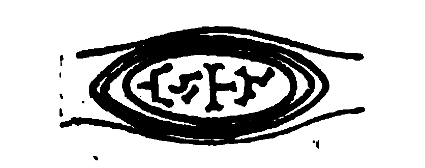 Figure extracted from File:Catalogue Sommaire des Musées de la Ville de Lyon, 1887.djvu